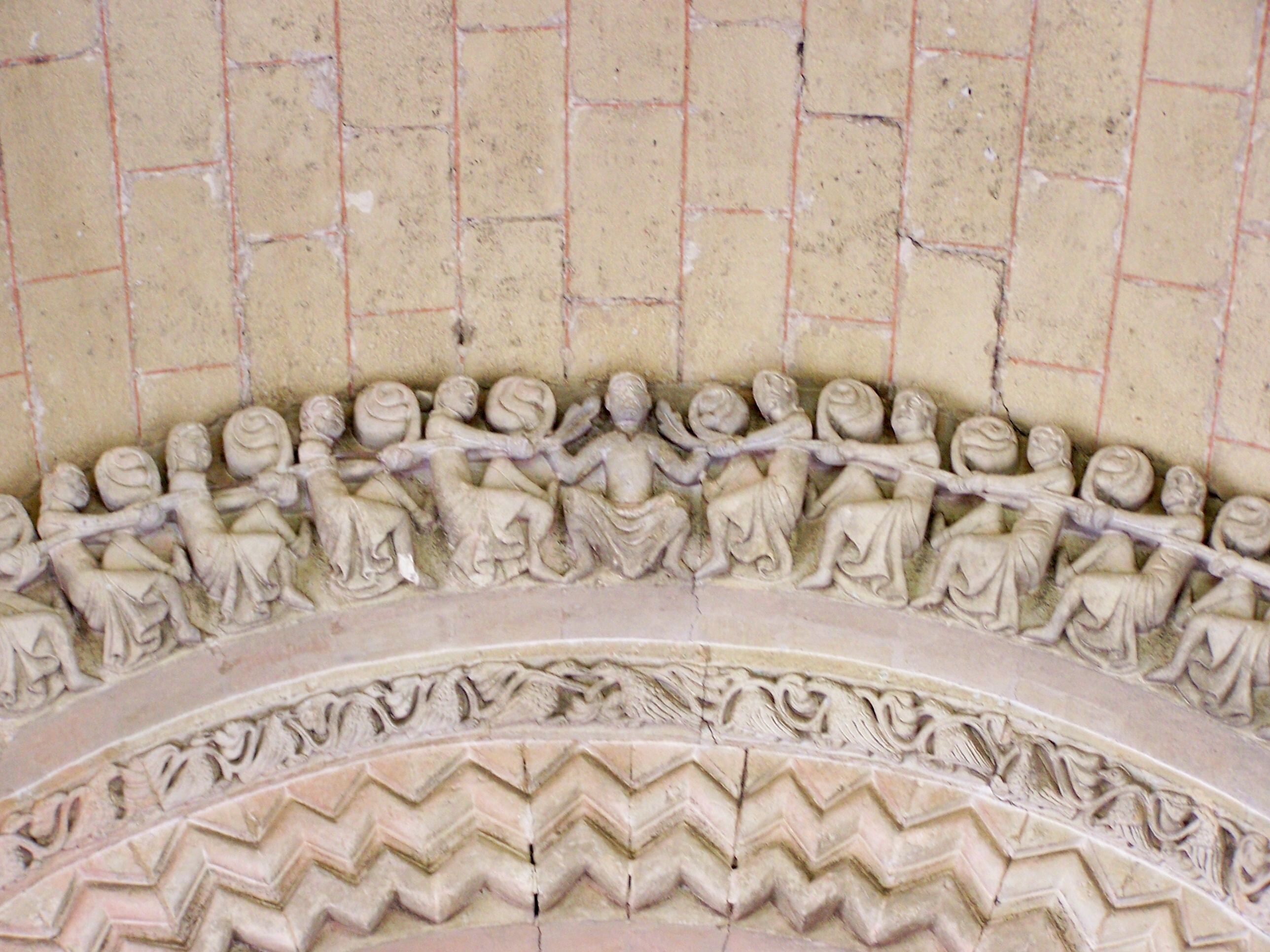 Les tireurs de corde : détail de la frise du porche de l'église de Sainte-Croix-du-Mont, Gironde, France